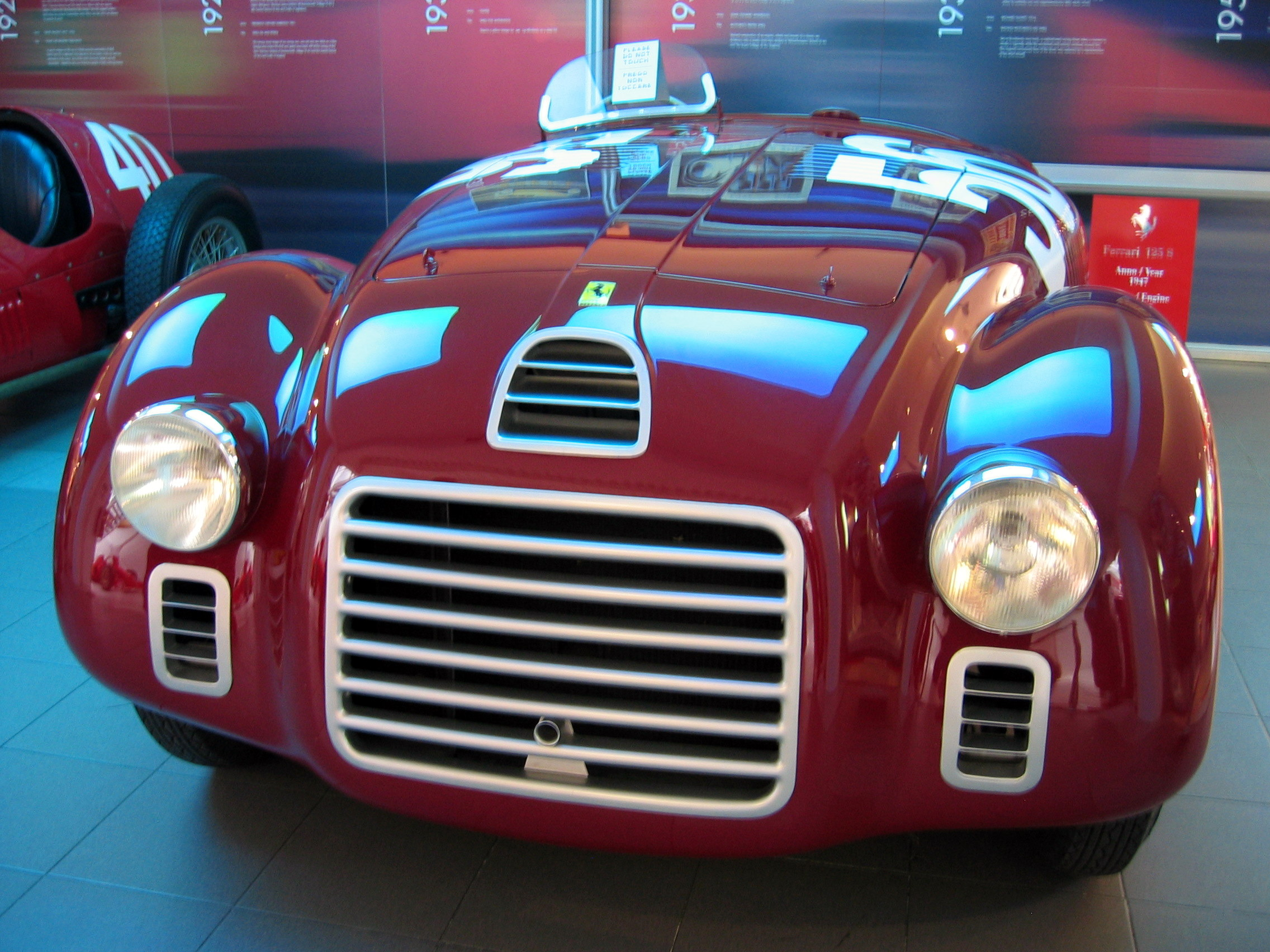 1947 Ferrari 125 S at Galleria Ferrari in Maranello, Italy